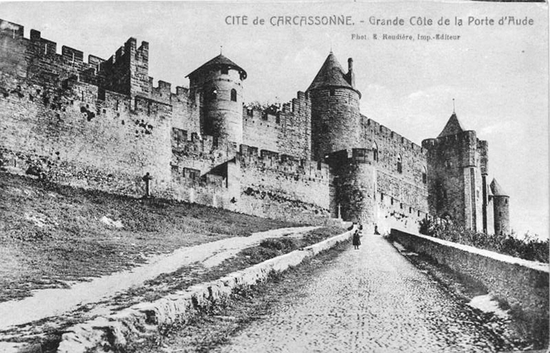 France, Aude (11), Carcassonne carte postale de la cité de Carcassonne